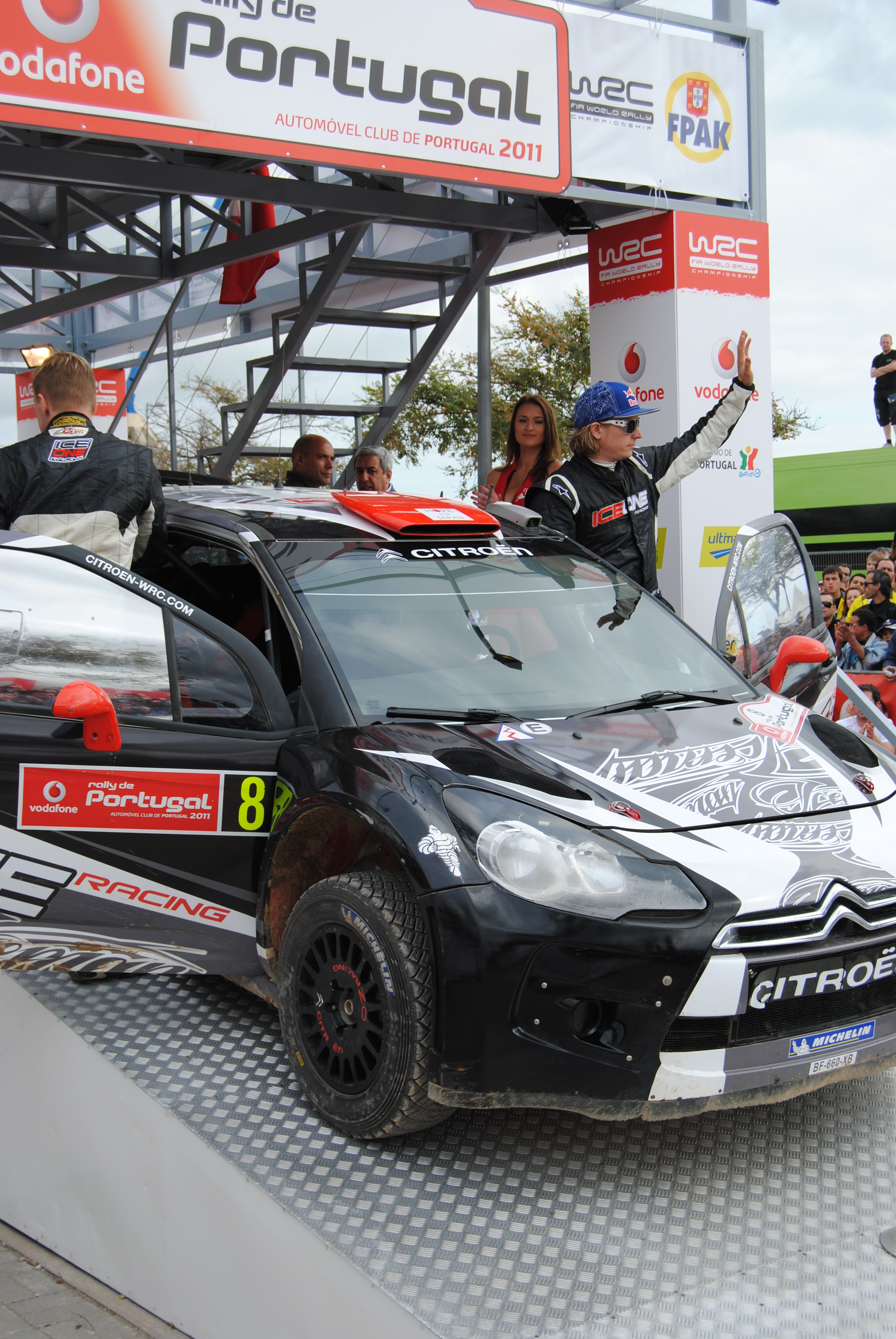 Kimi Raikkonen Rally de Portugal 2011